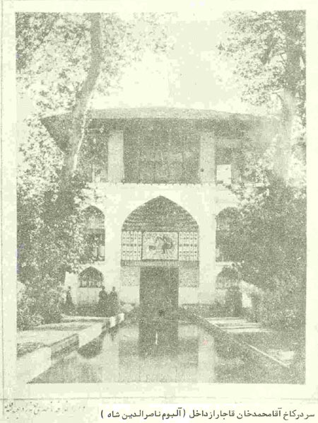 عمارت تابستانی آقامحمدخان قاجار در ساری